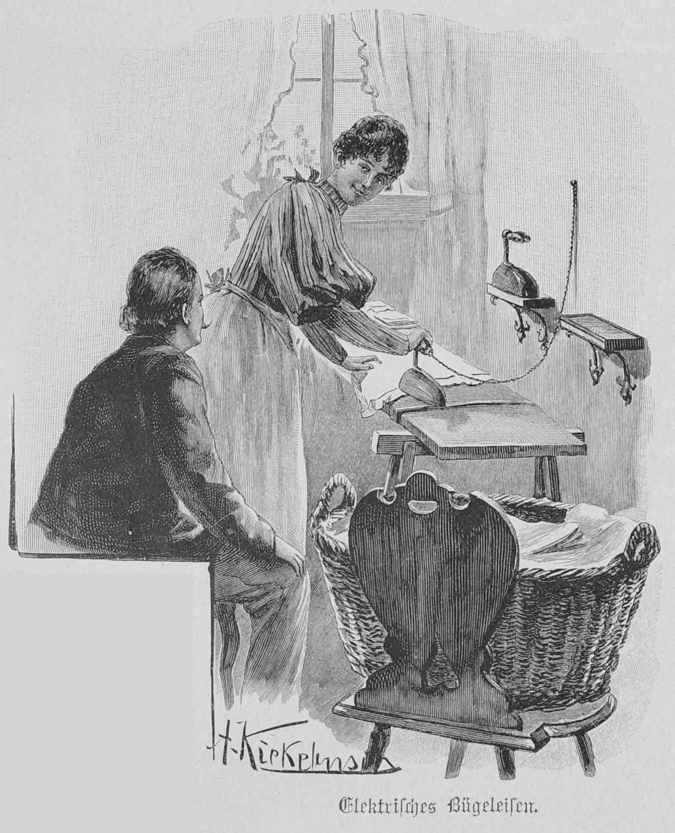 Bild aus Seite 18 in "Die Gartenlaube". Image from page 18 of journal Die Gartenlaube, January 1897. Text Titel: "Elektricität im Häuse" (Electricity in Homes) Auch/also: File:Die_Gartenlaube_(1897)_018_Manhattan.jpg - Manhattan skyline.